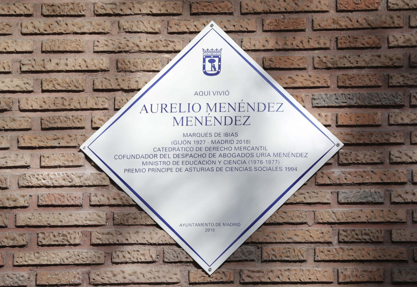 Chamartín recuerda con una placa a Aurelio Menéndez Menéndez. En el domicilio de la calle Segre donde residió el jurista, político y Premio Príncipe de Asturias de Ciencias Sociales (1994) El acto ha contado con la presencia de Mauricio Valiente, concejal del distrito, representantes de grupos políticos, así como familiares y amigos 27/12/2018. El distrito de Chamartín ha querido rendir homenaje esta mañana a su vecino Aurelio Menéndez Menéndez, Marqués de Ibias (1927-2018) mediante el descubrimiento de una placa en la que fue su residencia en la calle Segre, 20.